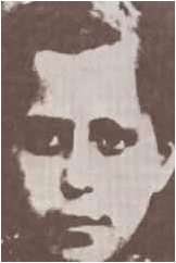 Ибе Паликуќа